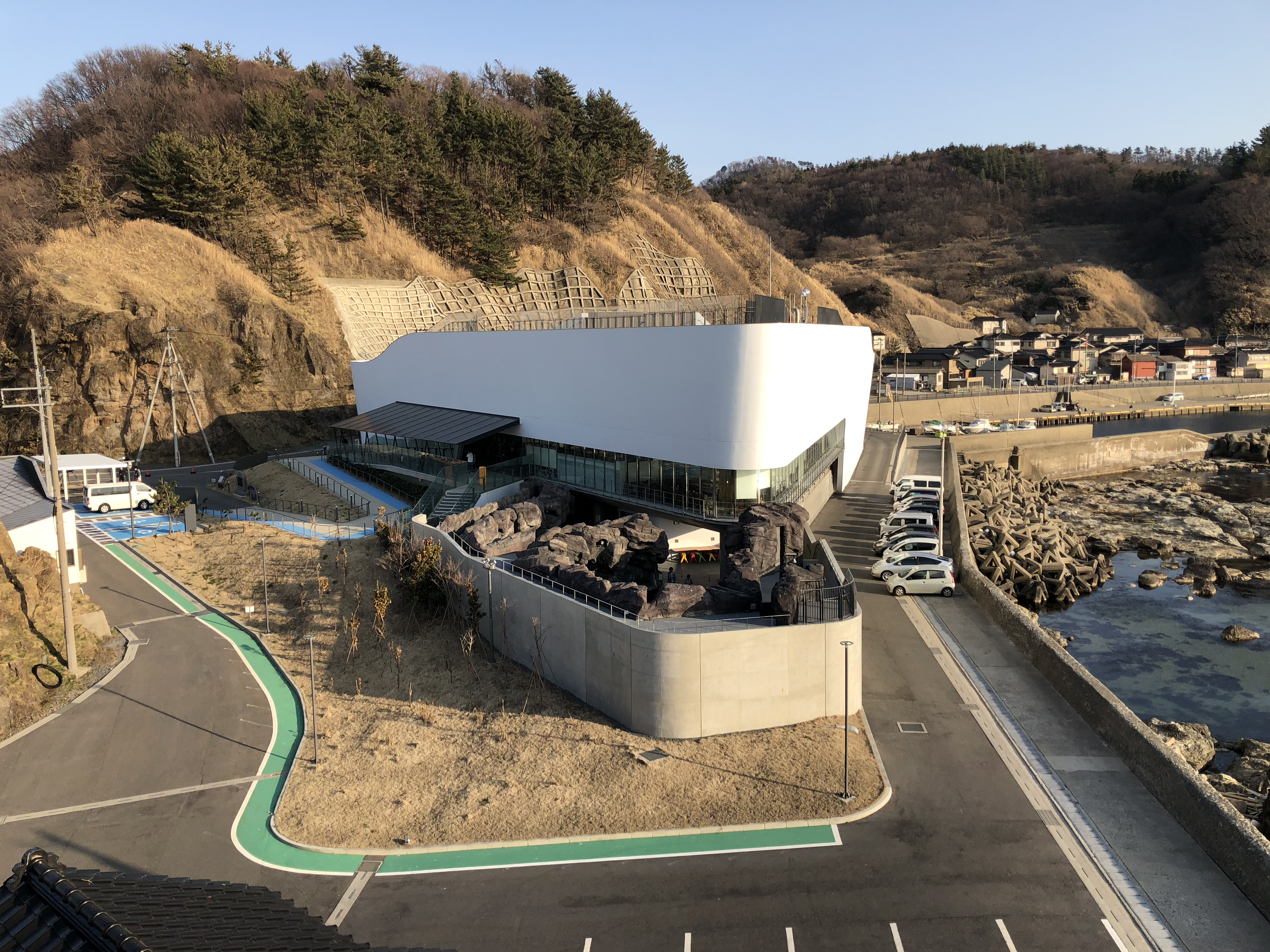 鶴岡市立加茂水族館